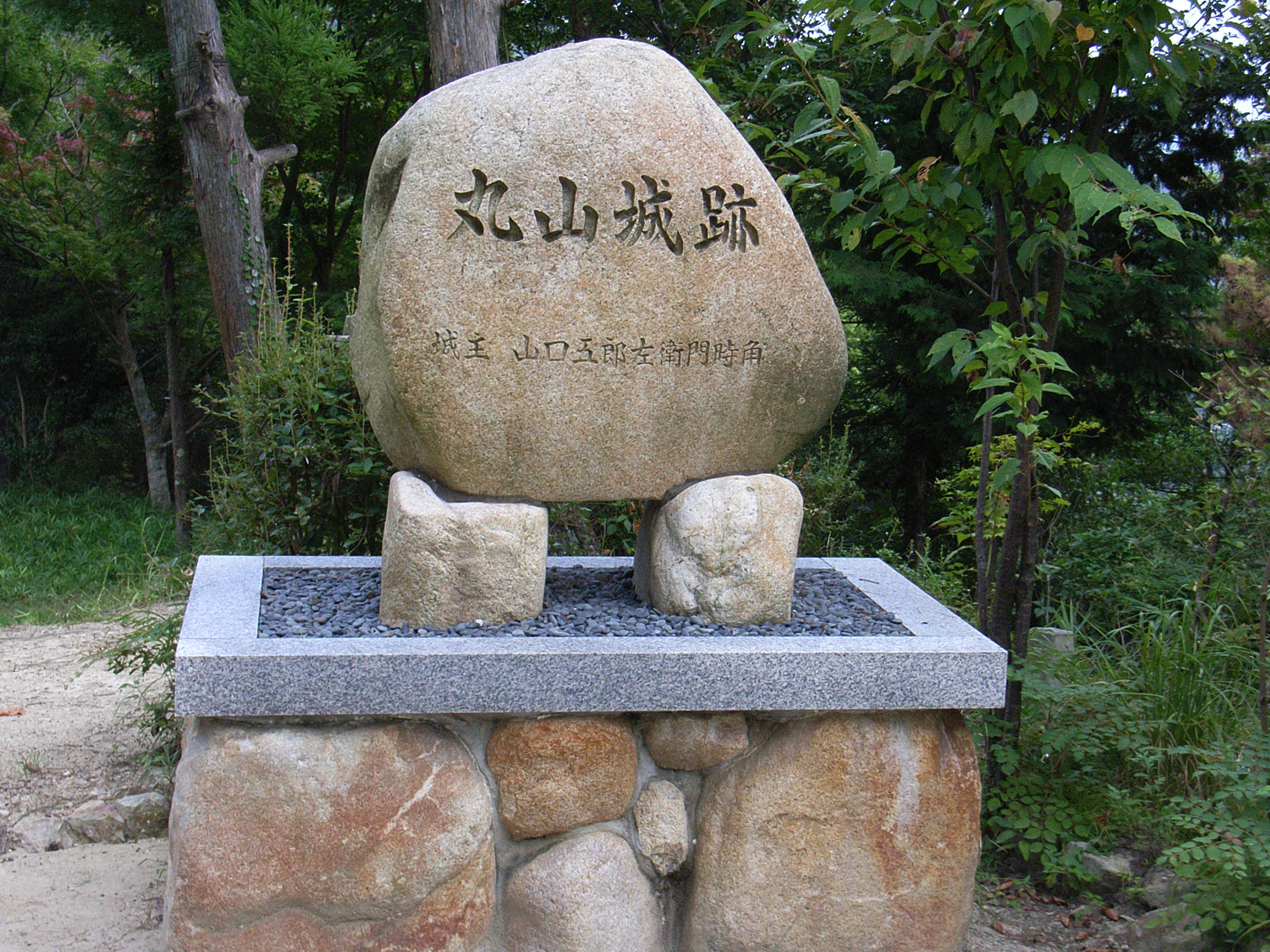 丸山城（摂津国有馬郡・現在の西宮市）